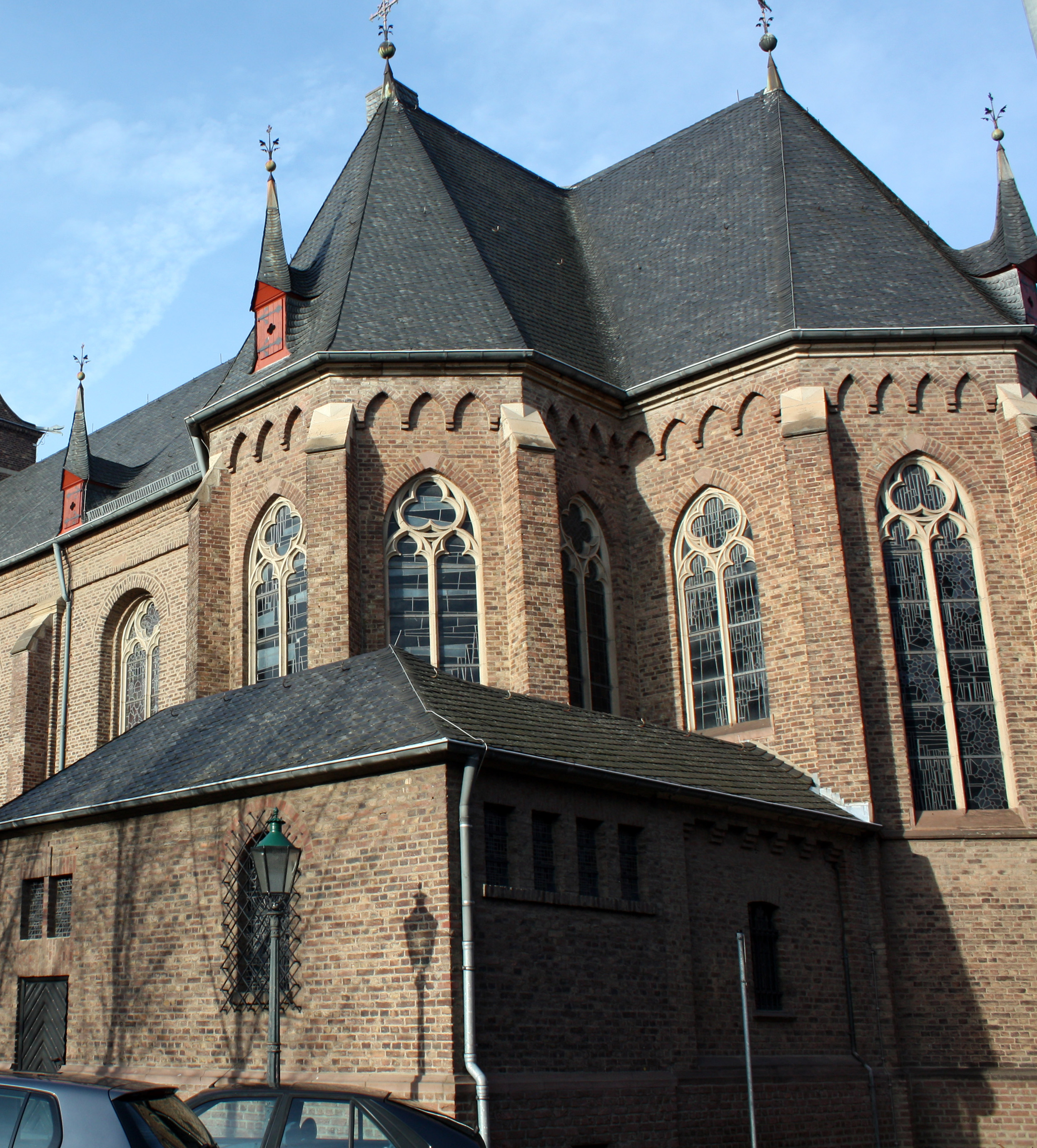 Erftstadt-Lechenich, St. Kilian neogotische Dachgauben